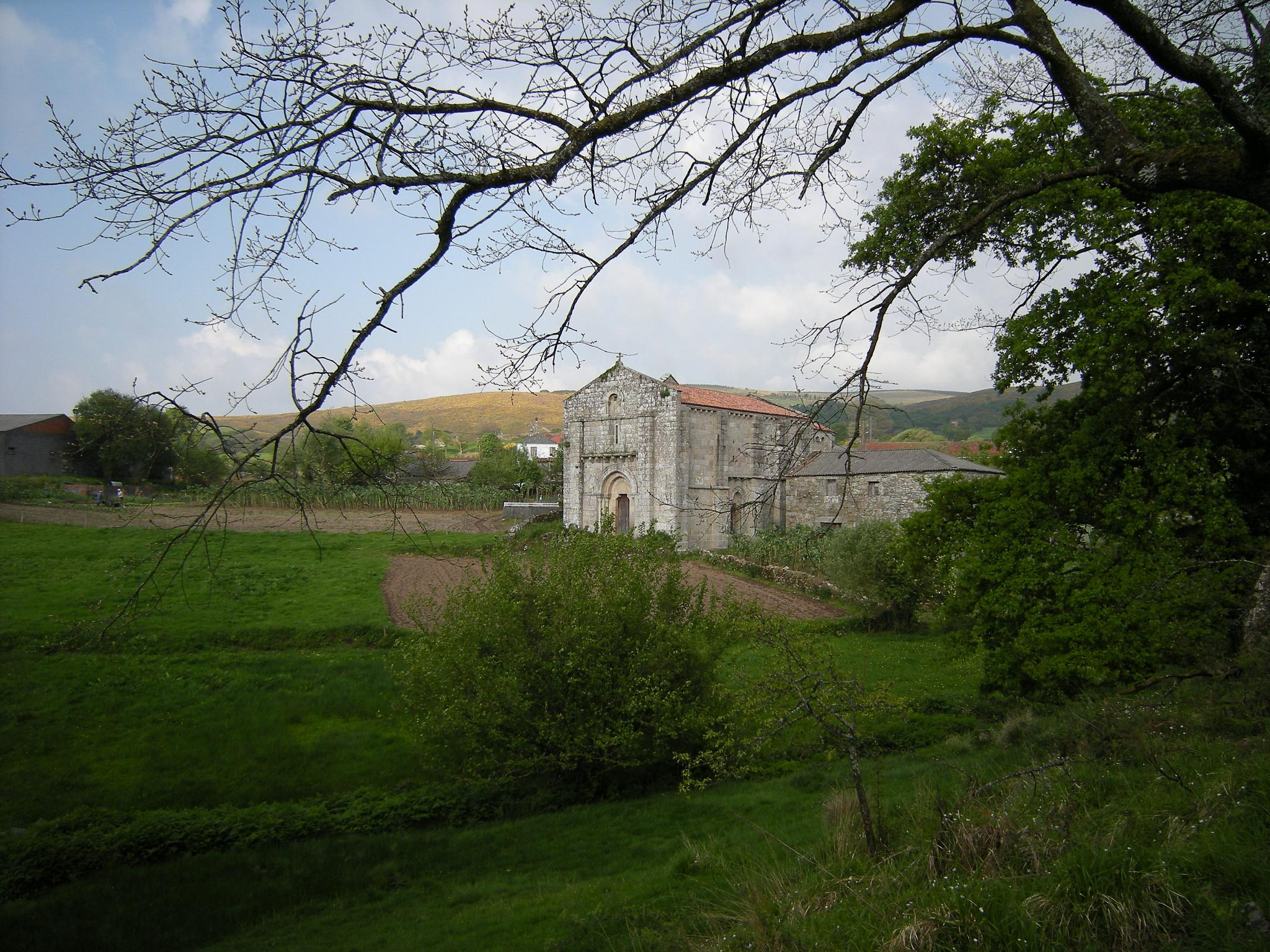 es: Vista de la iglesia desde el suroeste.